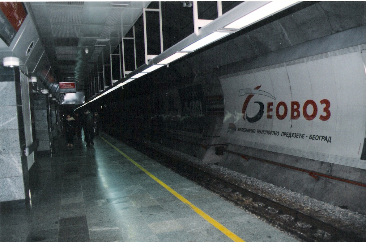 Stanica, Vukov spomenik.